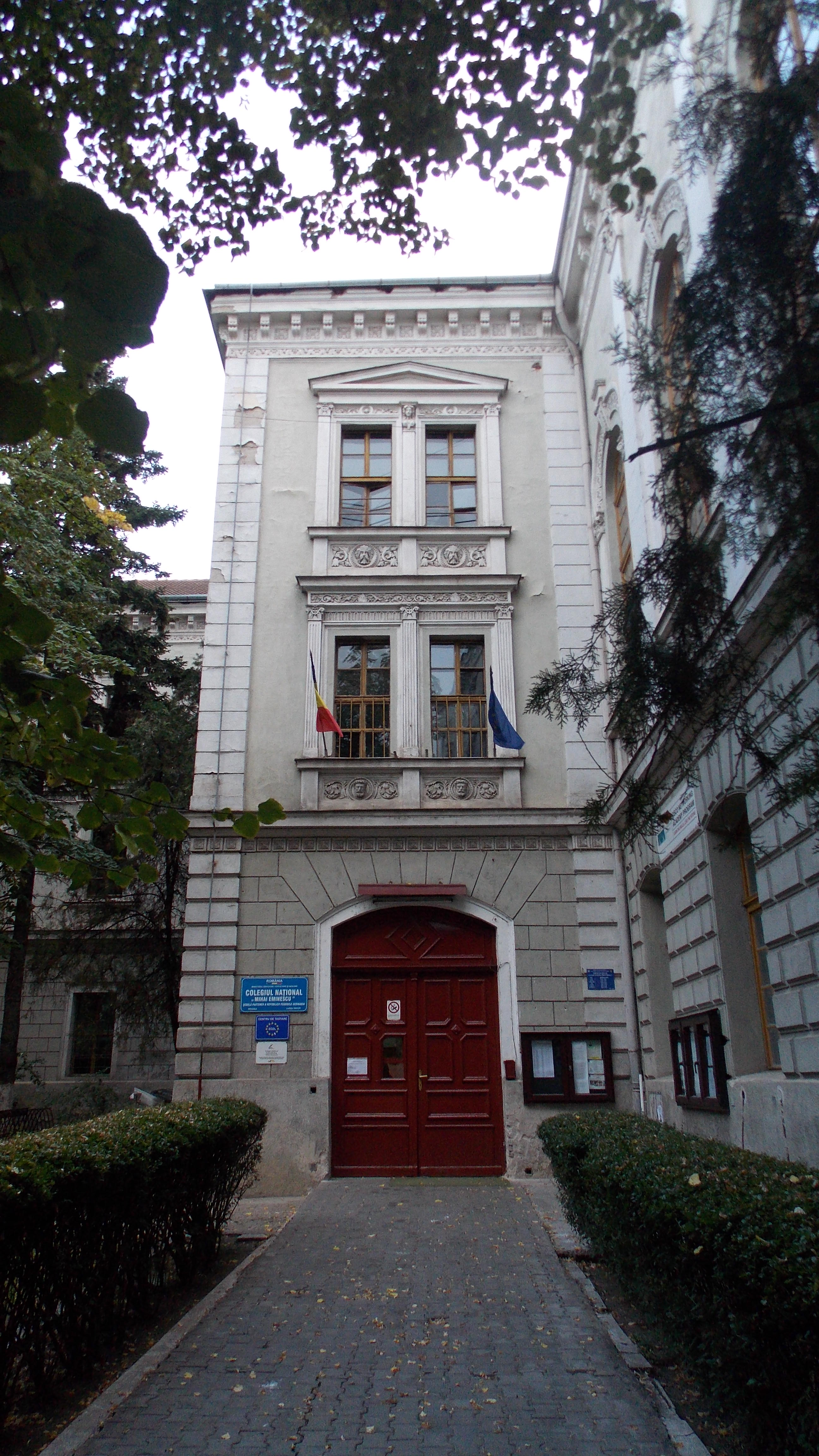 Colegiul Național "Mihai Eminescu", fosta mănăstire și Gimnaziu Premonstratens și Academie de Drept